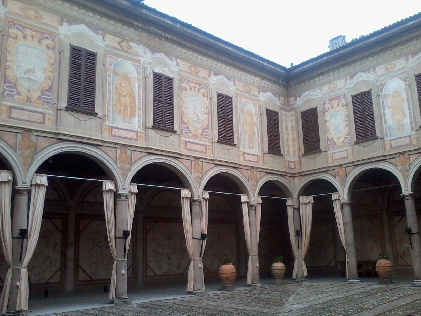 Cortile interno di Villa Gaia a Robecco sul Naviglio (MI) - Italia